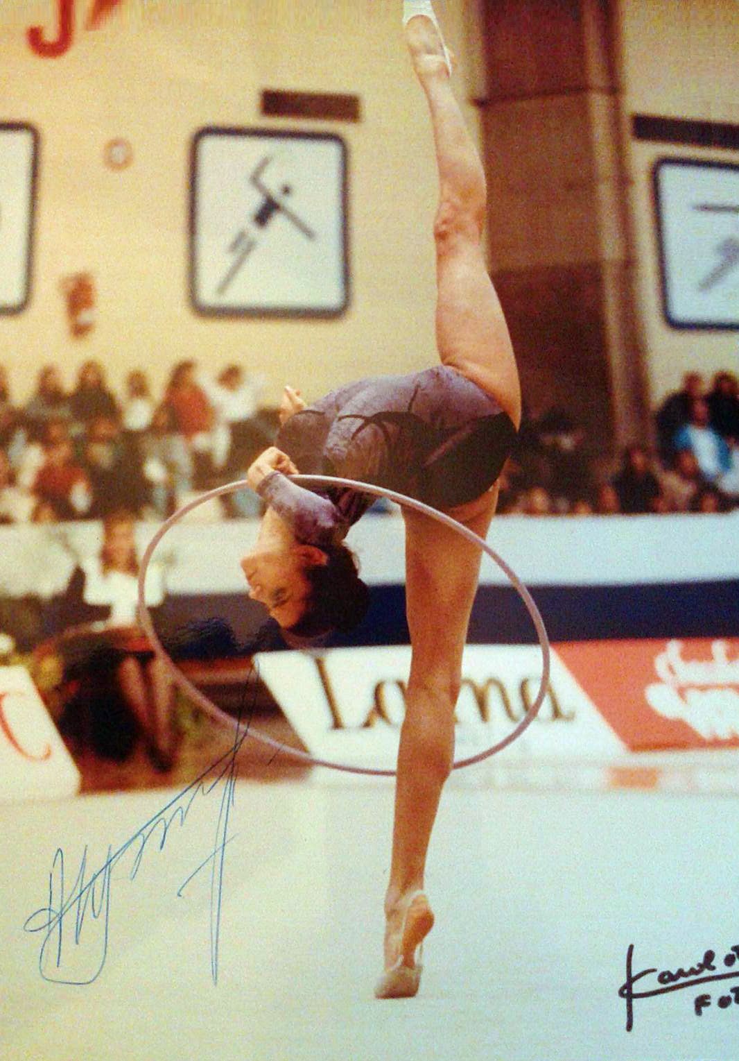 La gimnasta soviética Alexandra Timoshenko en el Torneo Preolímpico de Alicante en 1992.